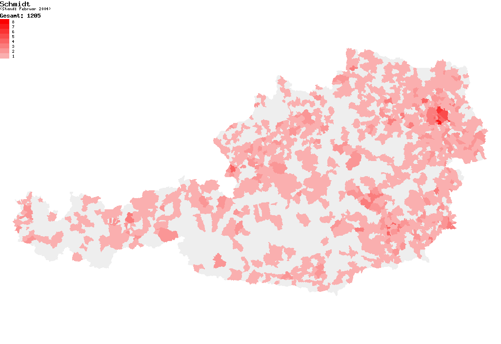 Verteilung des Nachnamens Schmidt in Österreich nach dem Telefonbuch mit Stand vom Februar 2004